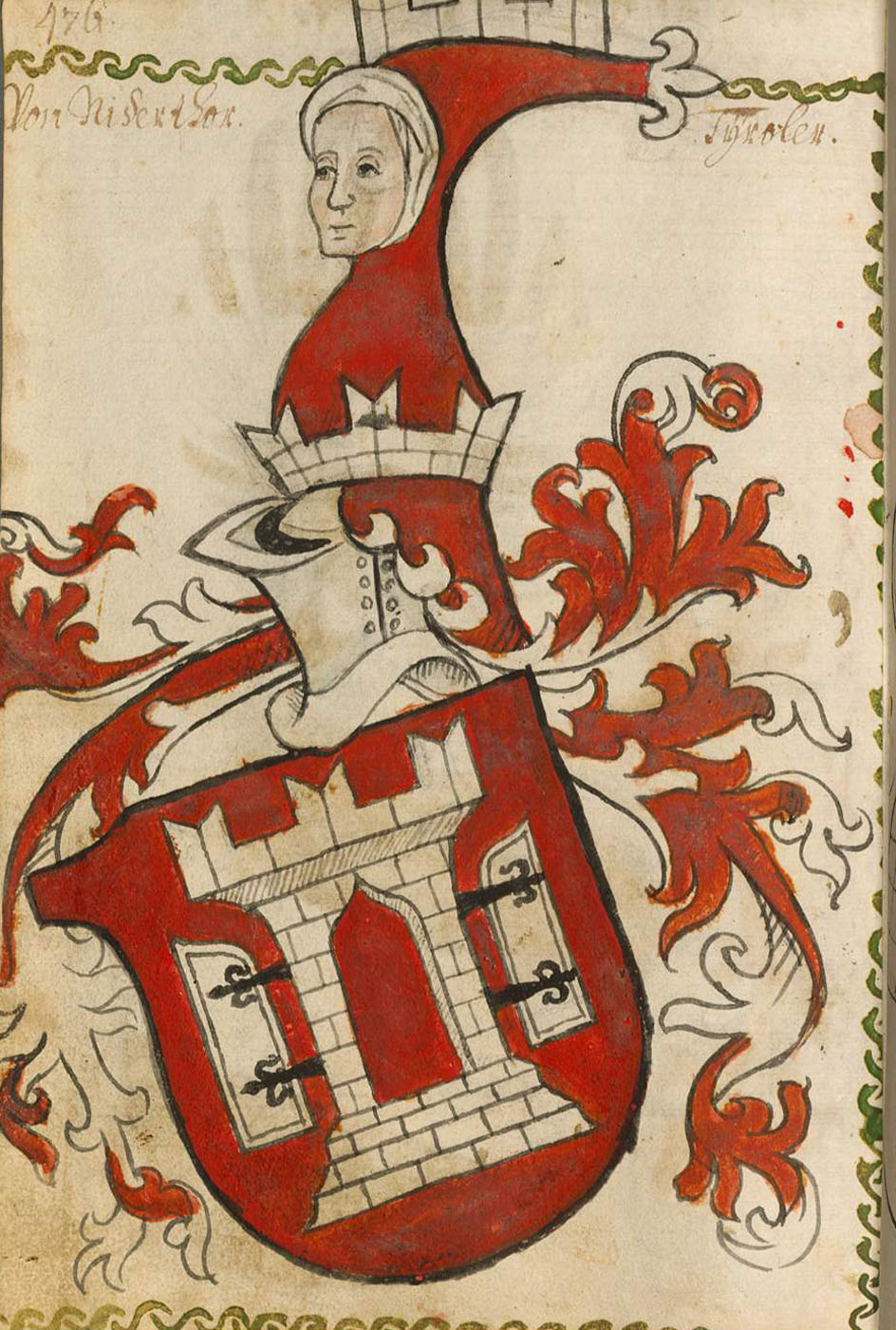 Scheibler'sches Wappenbuch , älterer Teil; Seite 476 Von Niderthor Tiroler